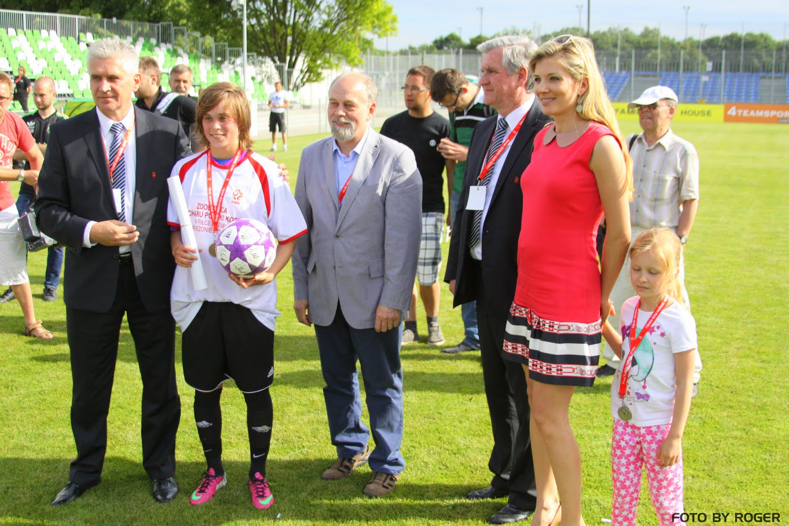 Ewa Pajor